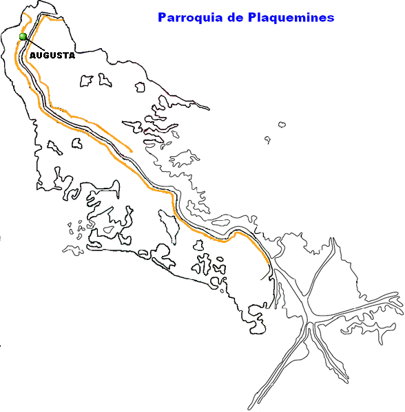 Augusta, Louisiana